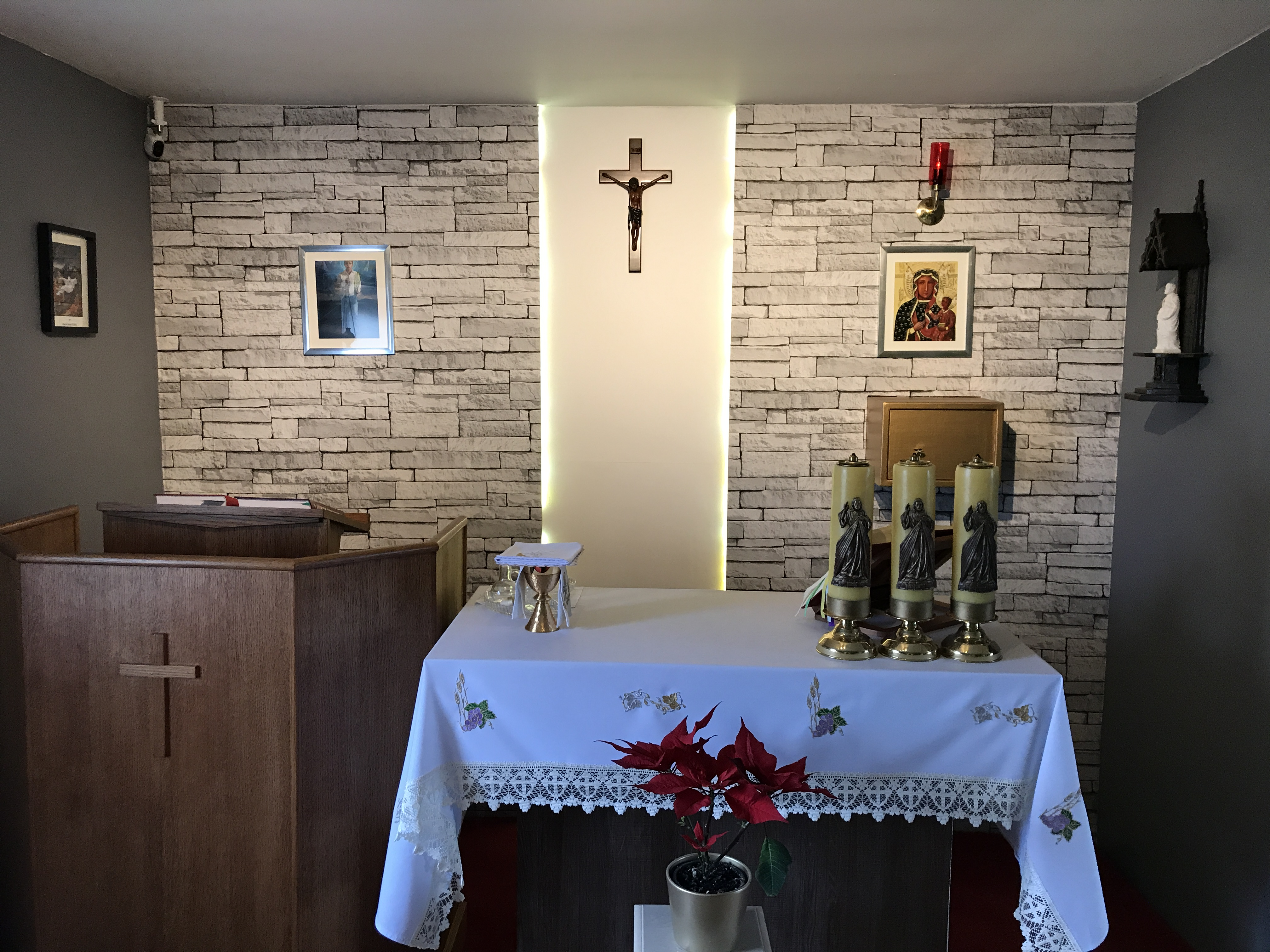 Kaplica pw św. Józefa Sanchez del Rio w Glasgow. Praca własna.